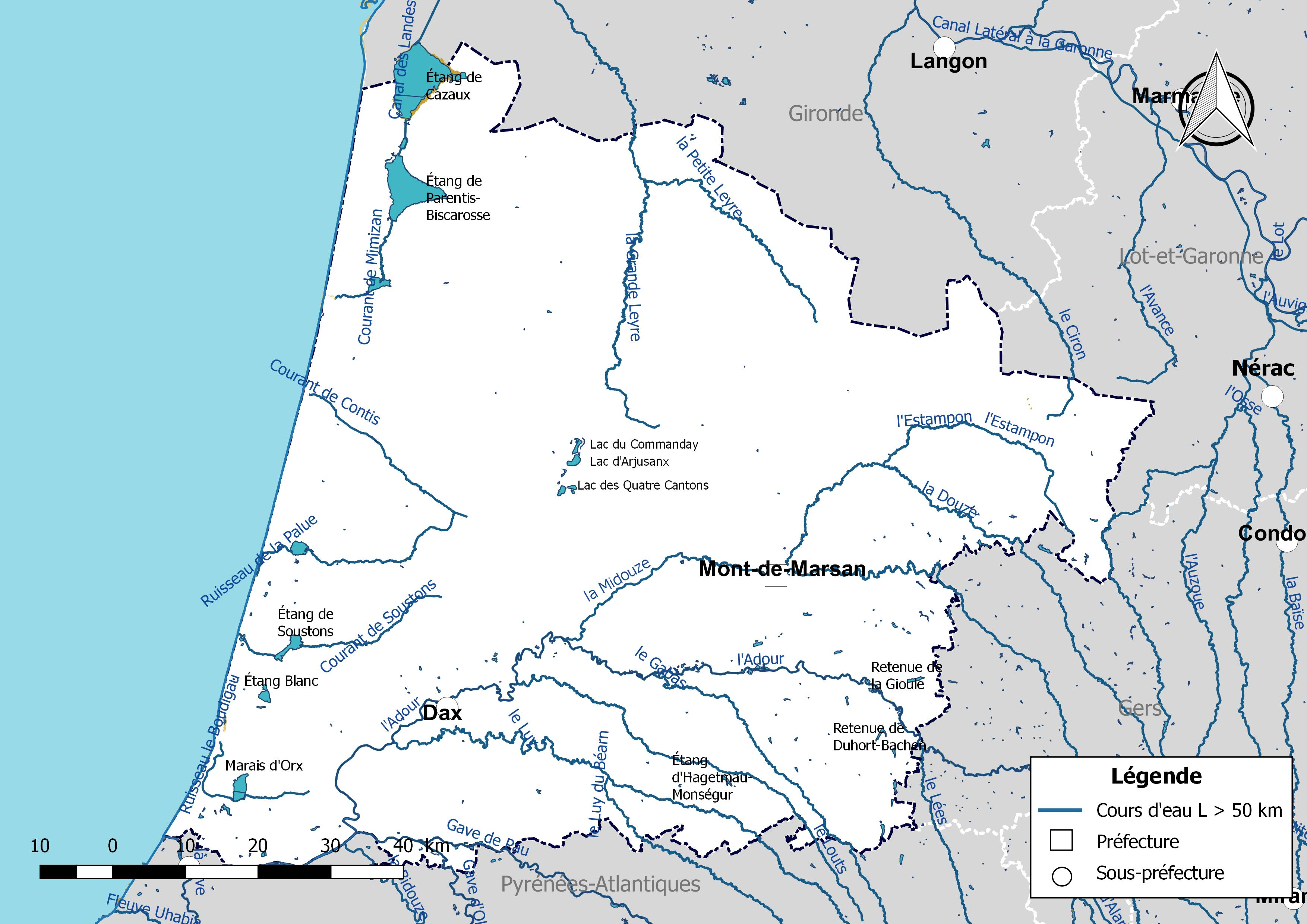 Carte des cours d'eau de longueur supérieure à 50 km drainant le département des Landes (France).